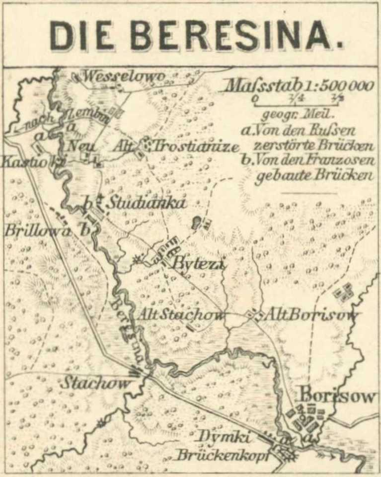 Die Beresina